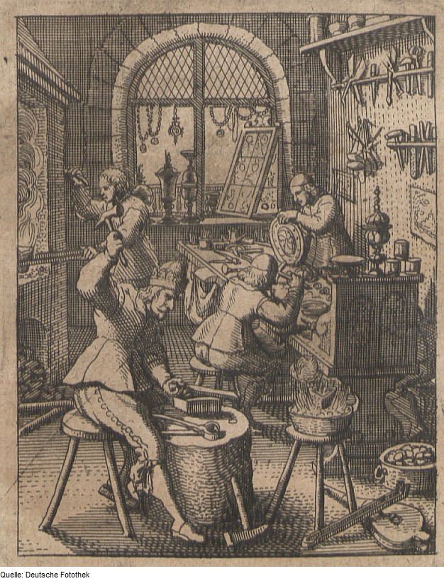 Original image description from the Deutsche Fotothek Ständebuch & Beruf & Handwerk & Goldschmied